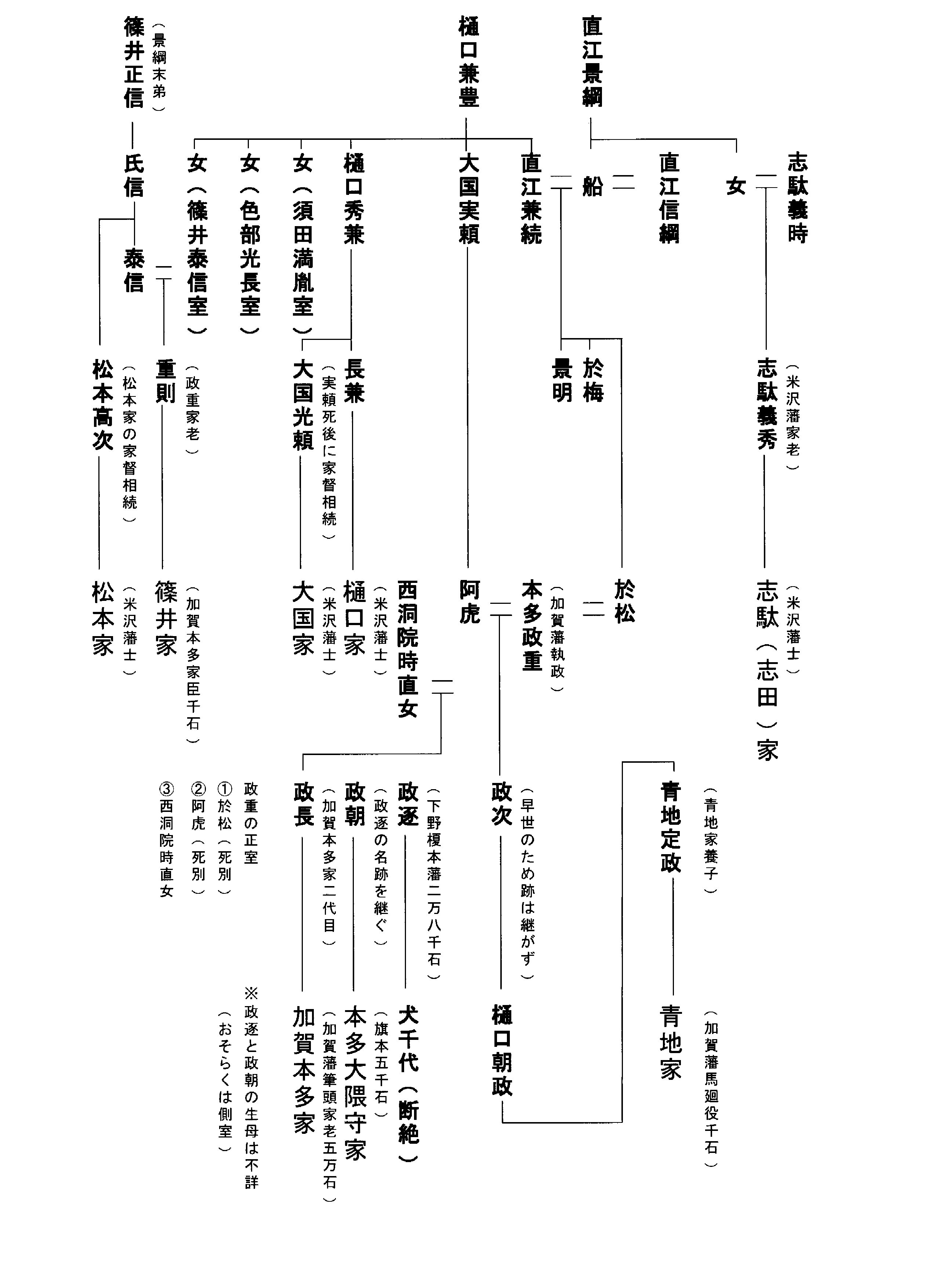 前版を一部訂正